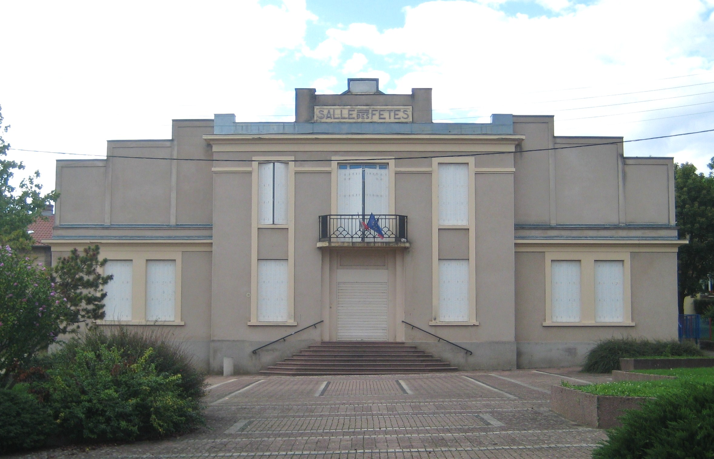 Description salle des fetes Valleroy Date8 August 2011Sourcemon appareil photoAuthorAimelaimePermission (Reusing this file) salle des fetes Valleroy